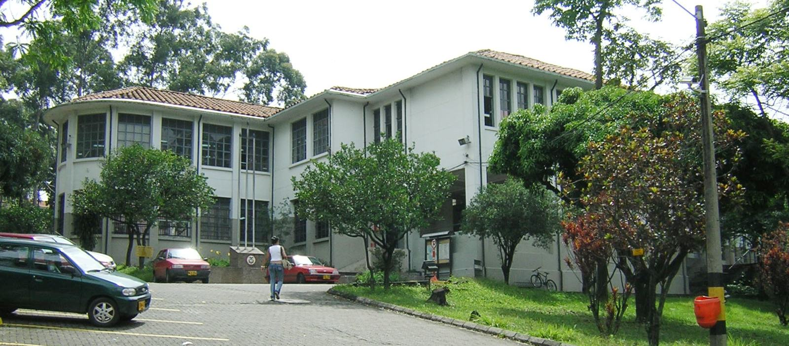 La Institución Universitaria Colegio Mayor de Antioquia es una institución de educación superior colombiana, su sede está ubicada en la ciudad de Medellín.